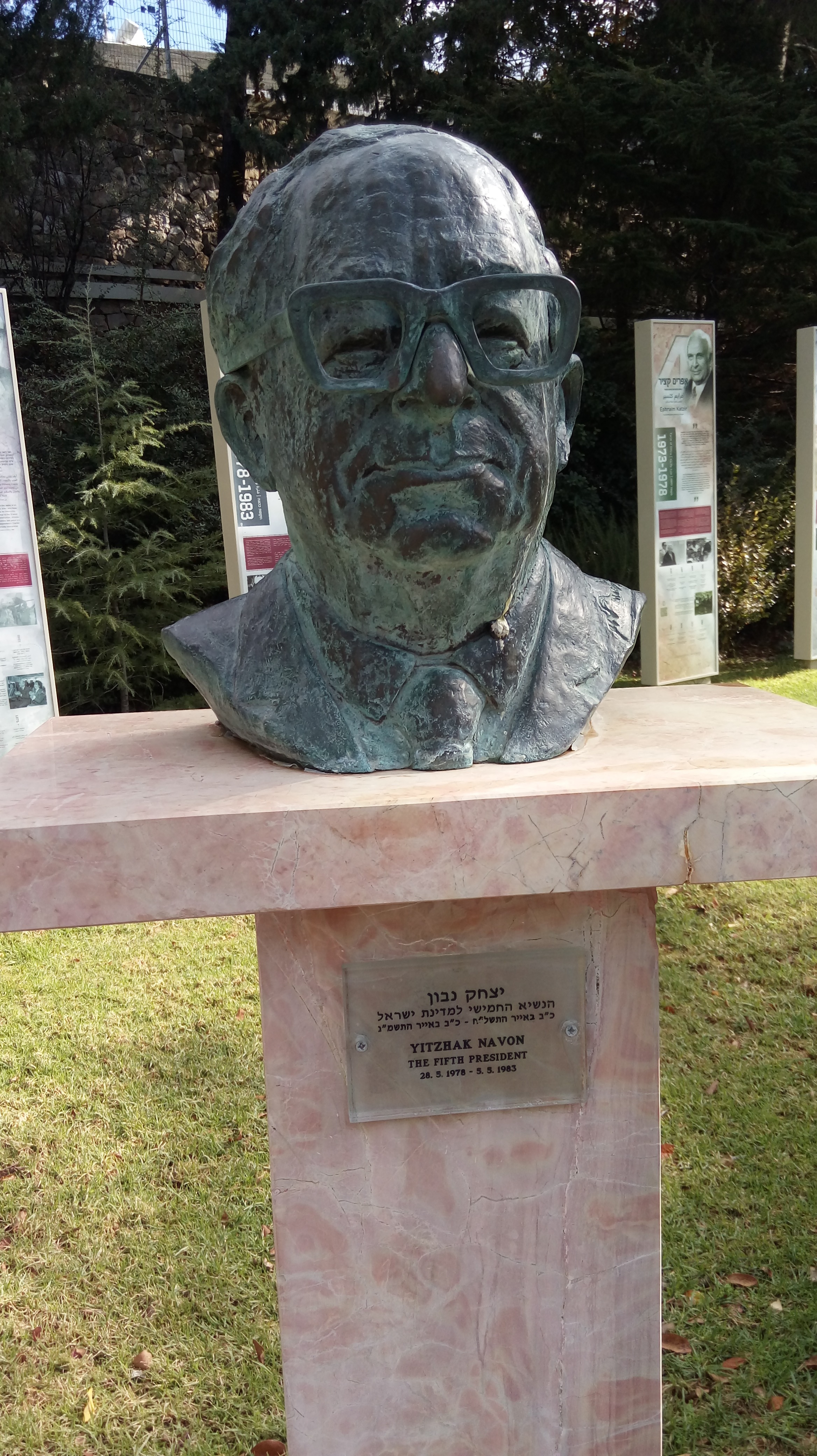 פסלו של יצחק נבון במשכן הנשיא